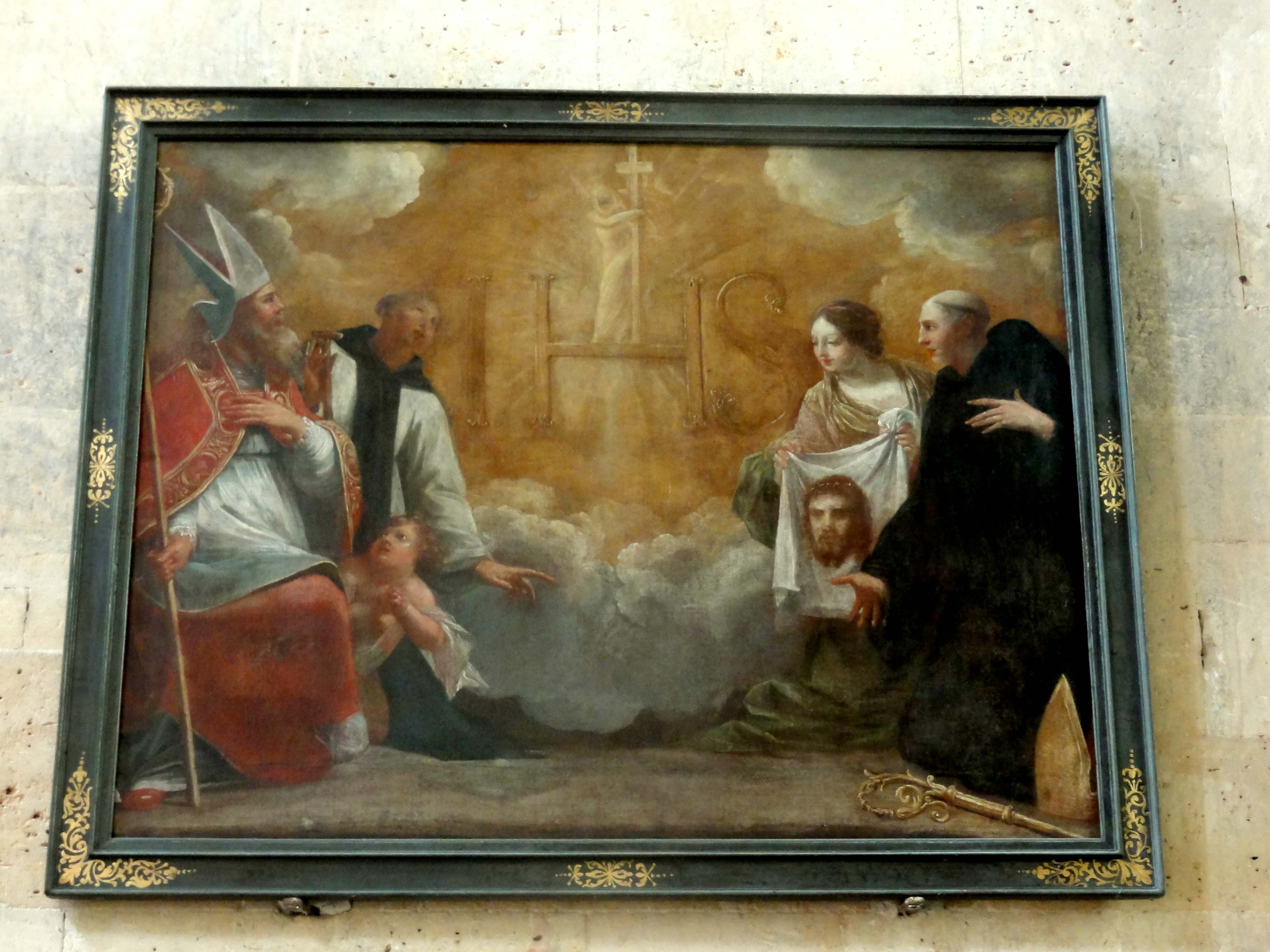 Tableau - L'Adoration du saint nom de Jésus, attribué à Eustache Le Sueur ou Jean Senelle, milieu XVIIe siècle.